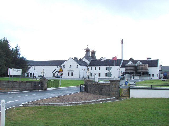 Dalwhinnie Distillery